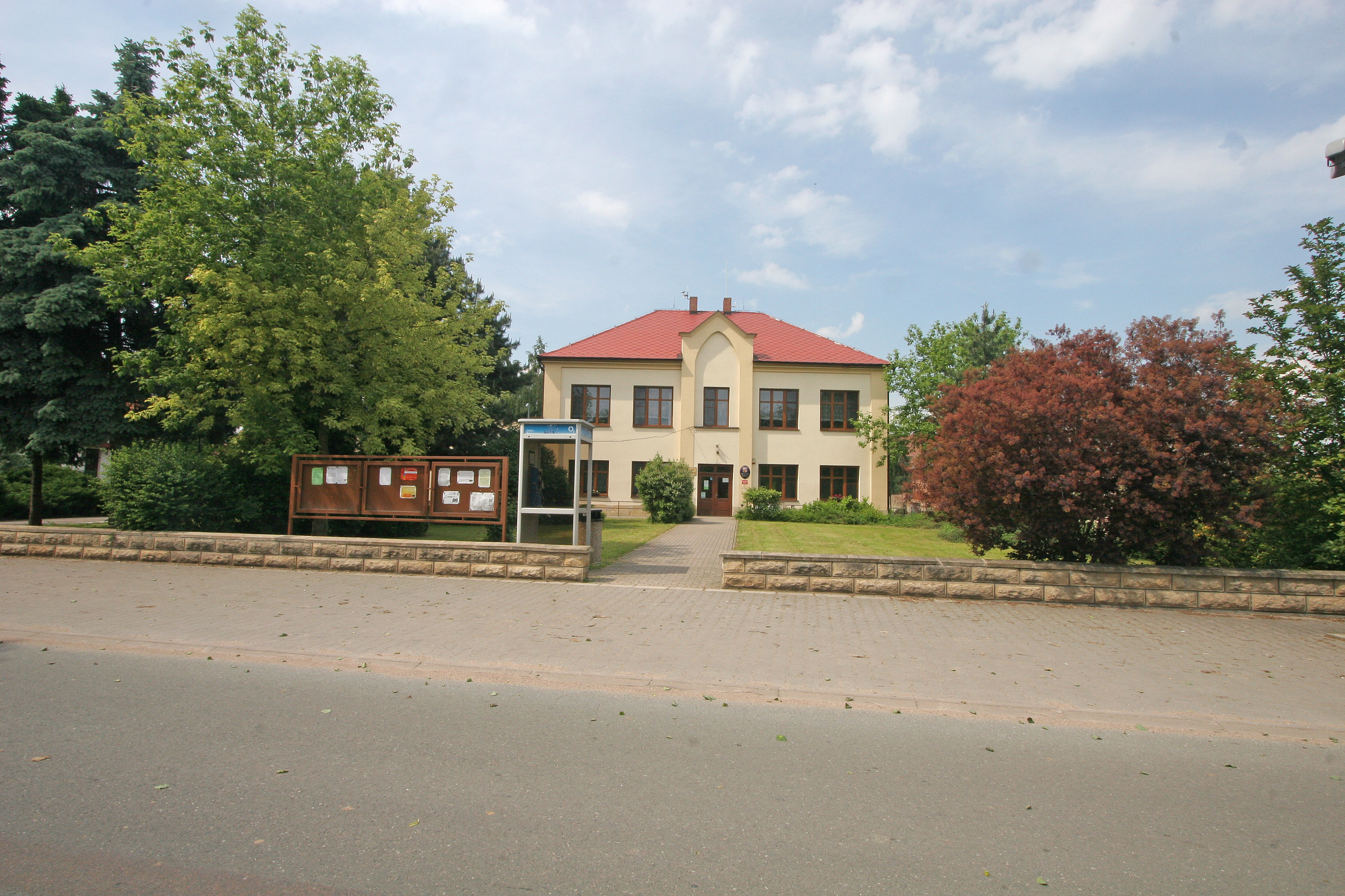 Roudnice obecní úřad